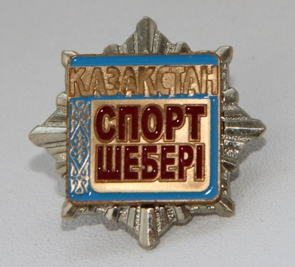 Мастер Спорта Республики Казахстан